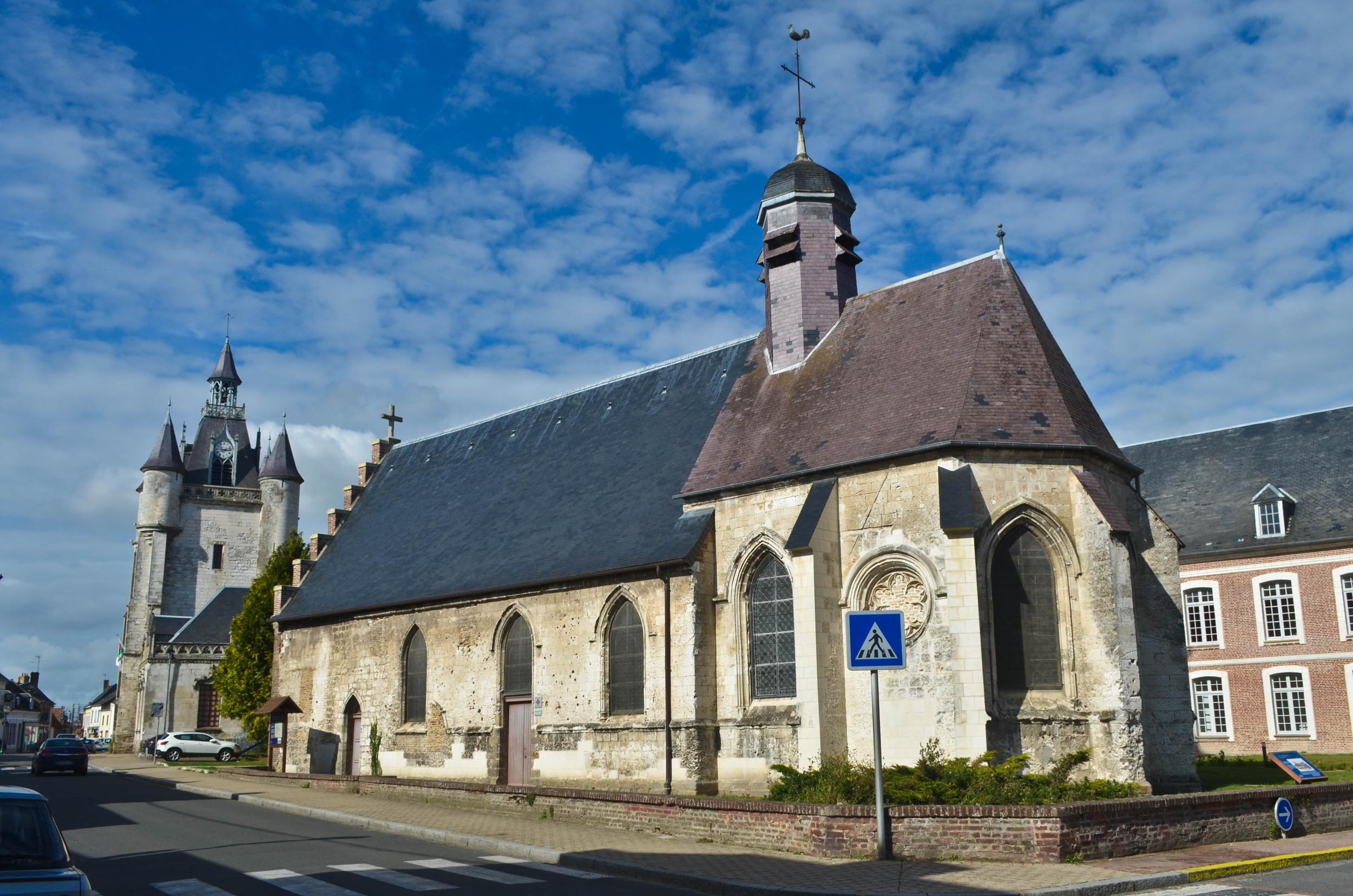 Beffroi et chapelle de l'Hospice de Rue, Somme, France